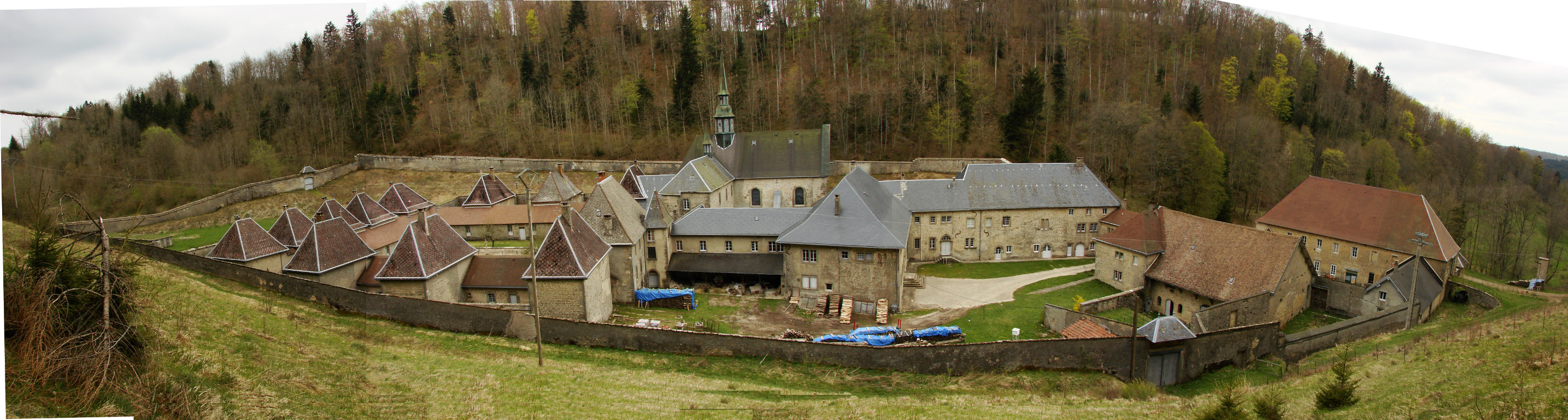 Vue des bâtiments de la chartreuse de Portes